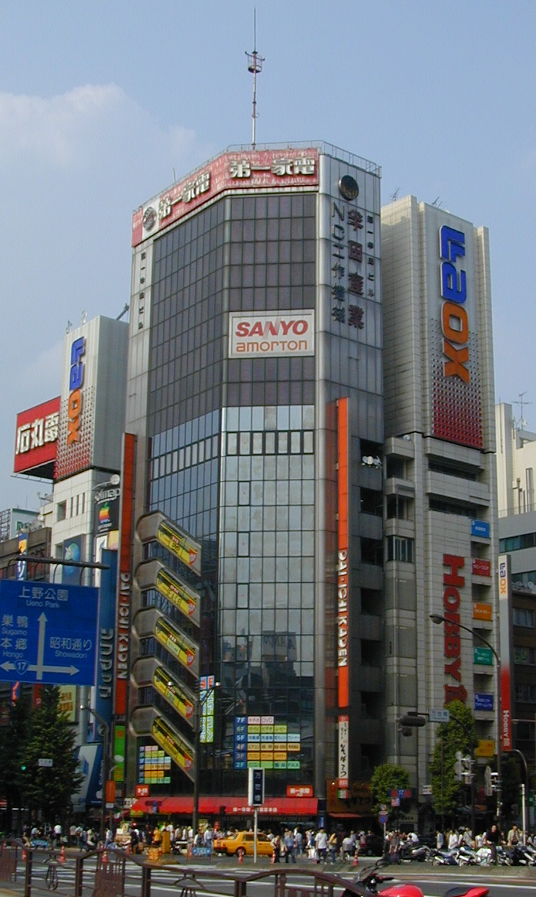 第一家庭電器秋葉原本店の写真。2002年03月19日頃撮影。